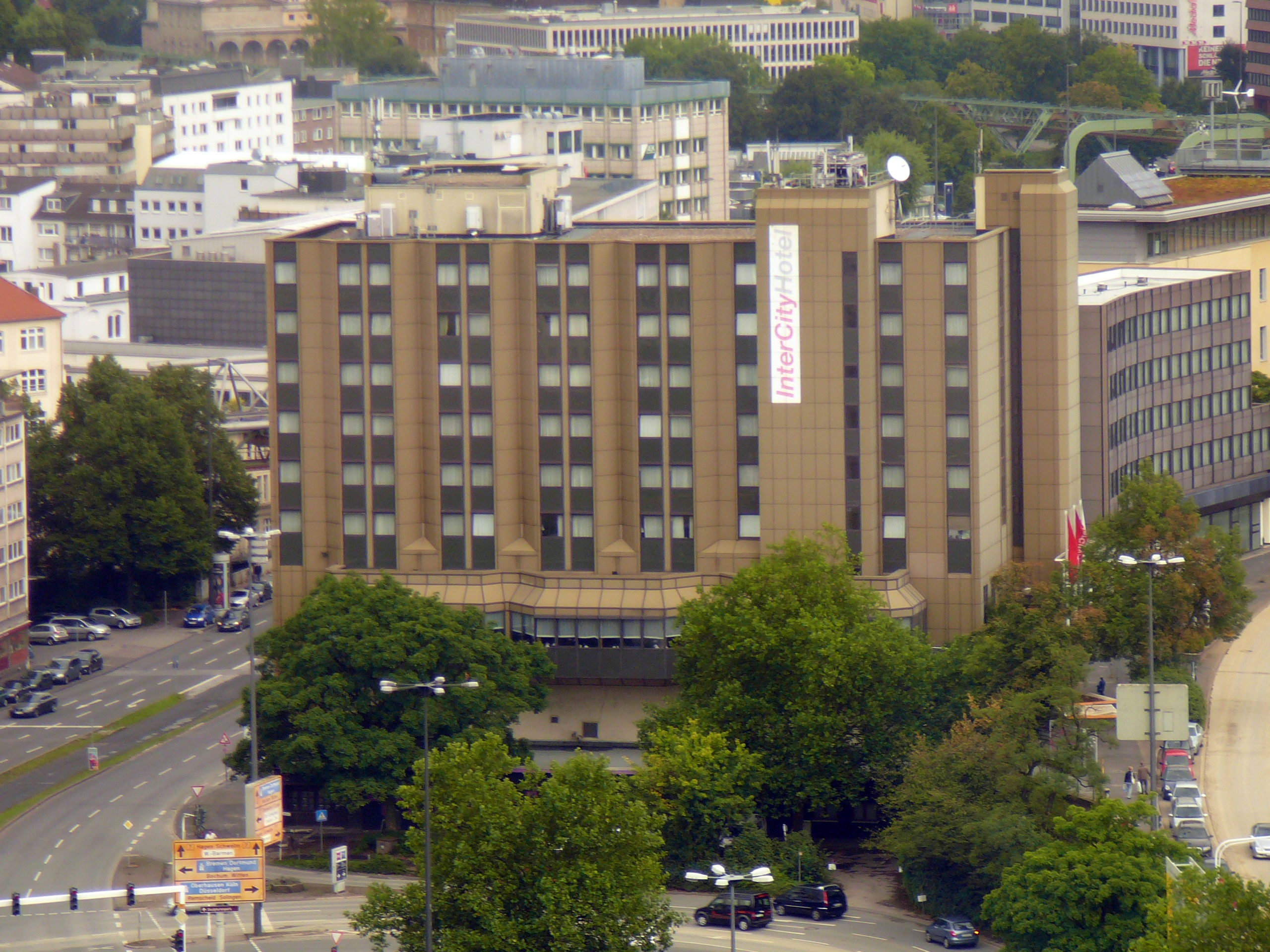 Wuppertal, Islandufer, Blick vom Sparkassenturm